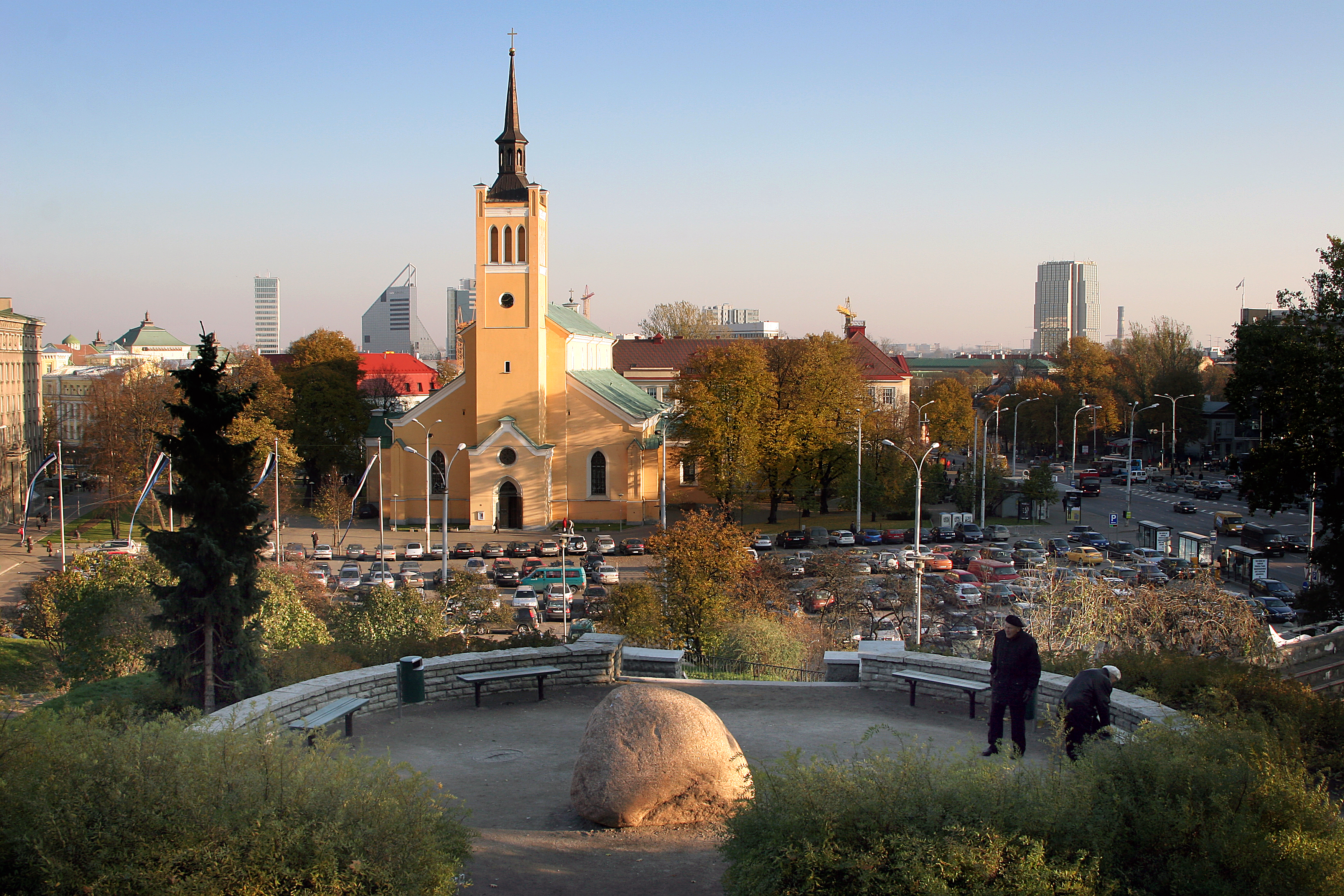 Tulevase Vabaduse monumendi asukohta tähistas sümboolne kaheksatonnine põllukivi. 02.11.2005